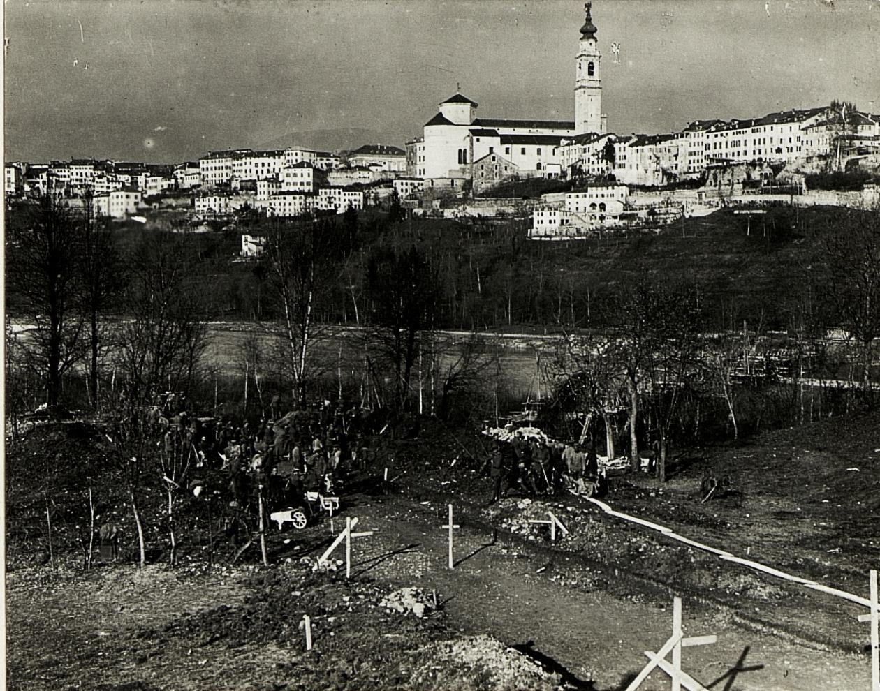 Straßenbau in Belluno.